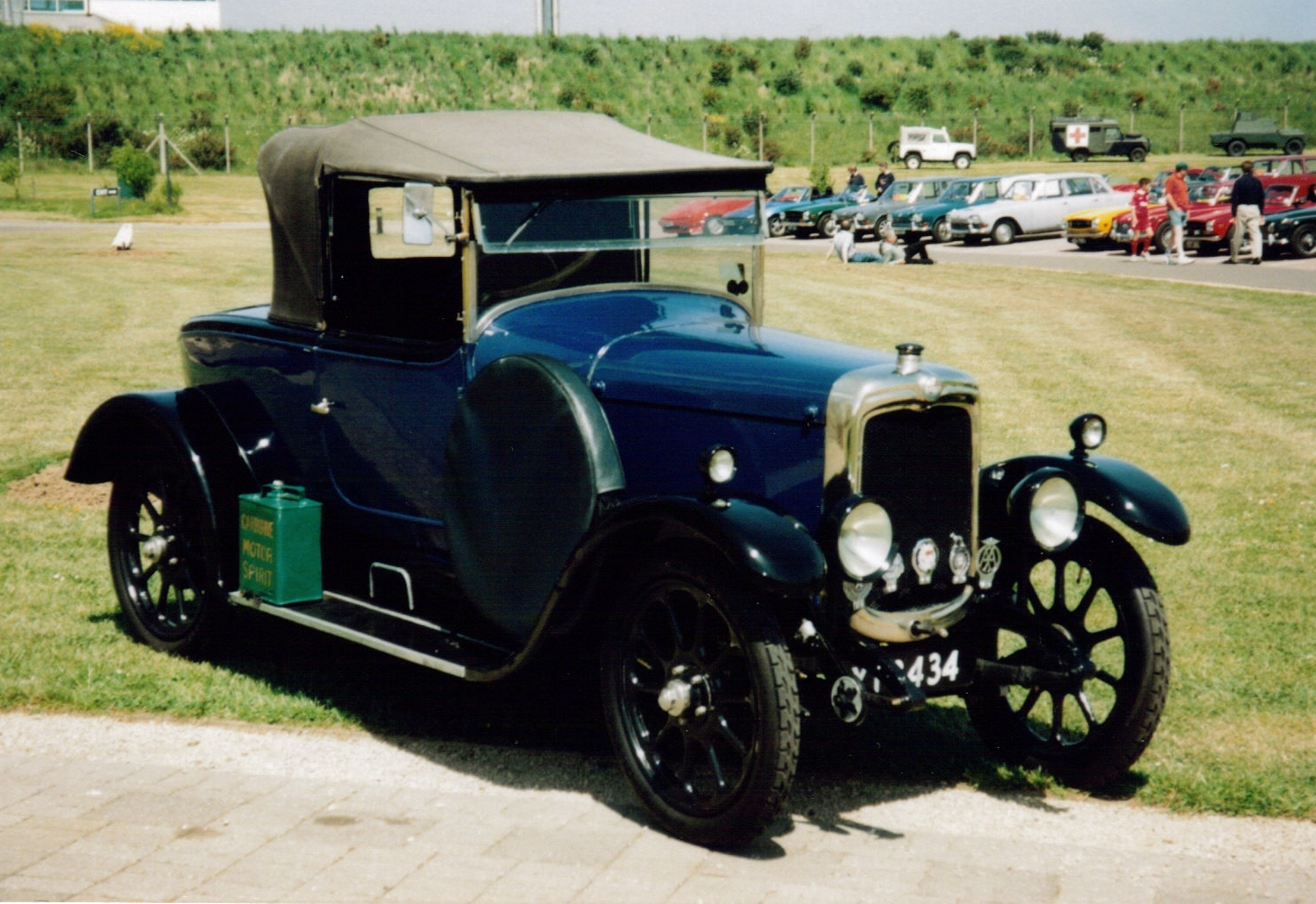 Triumph 10/20, 1923, einziger noch existierendee Wagen